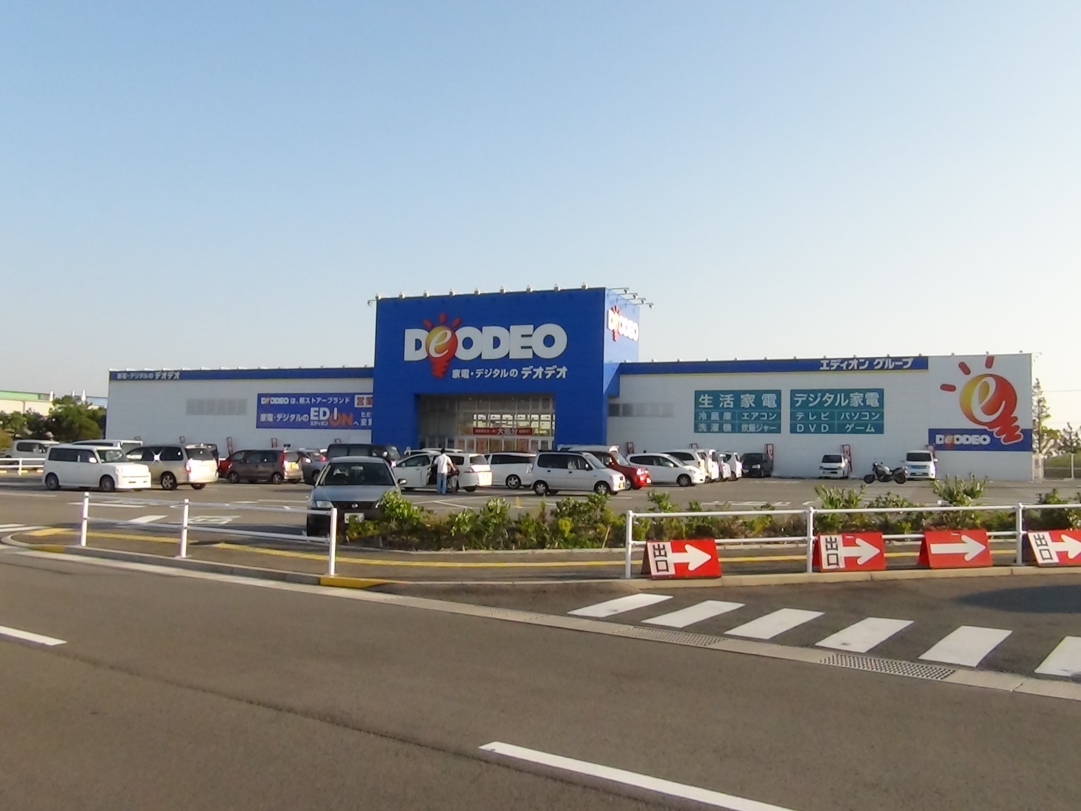 2012年10月28日に投稿者自身が撮影。 2012年11月下旬にエディオンアウトレットに生まれ変わる予定。